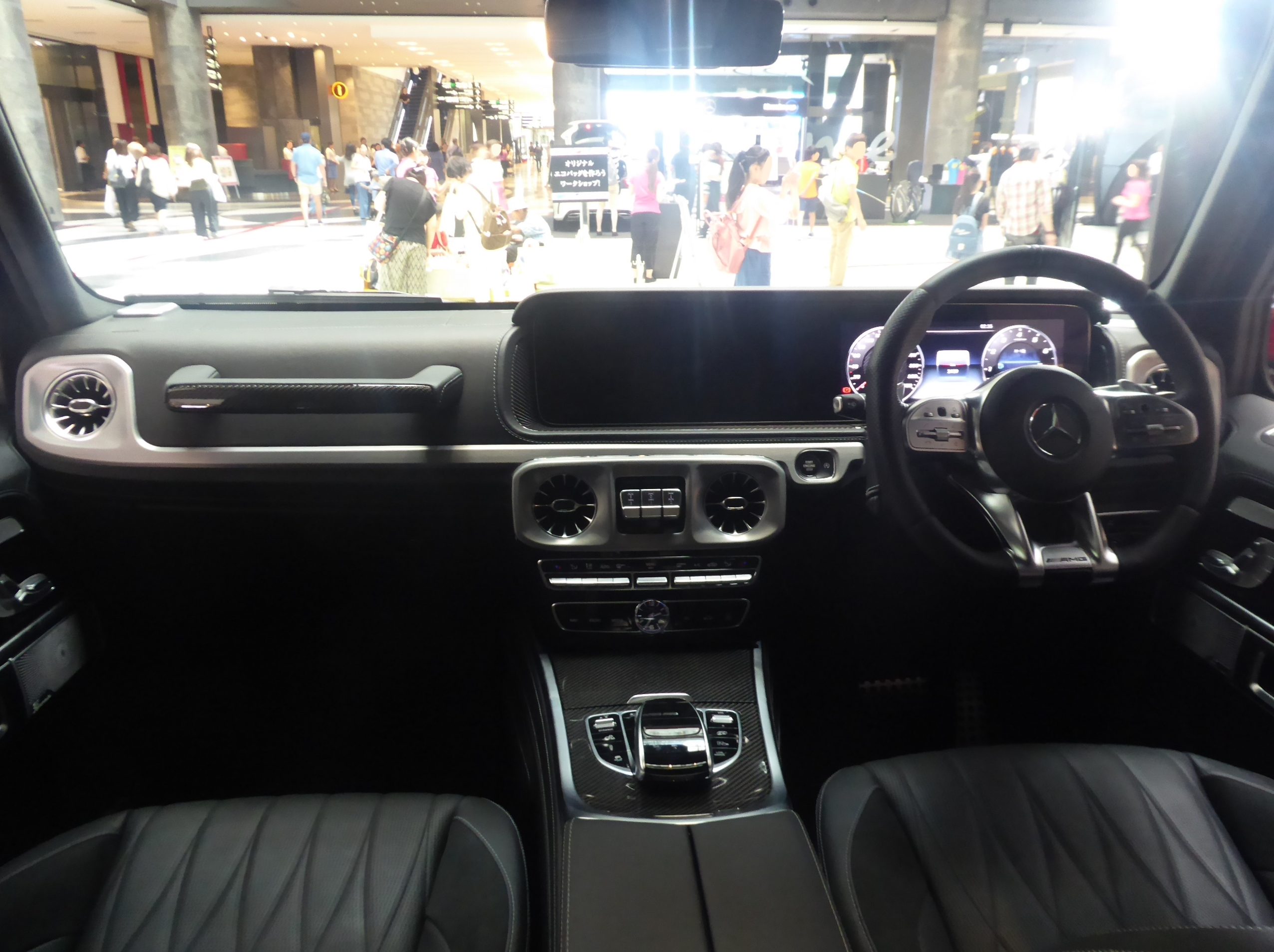 W464系メルセデスAMG・G63のインテリアを撮影。